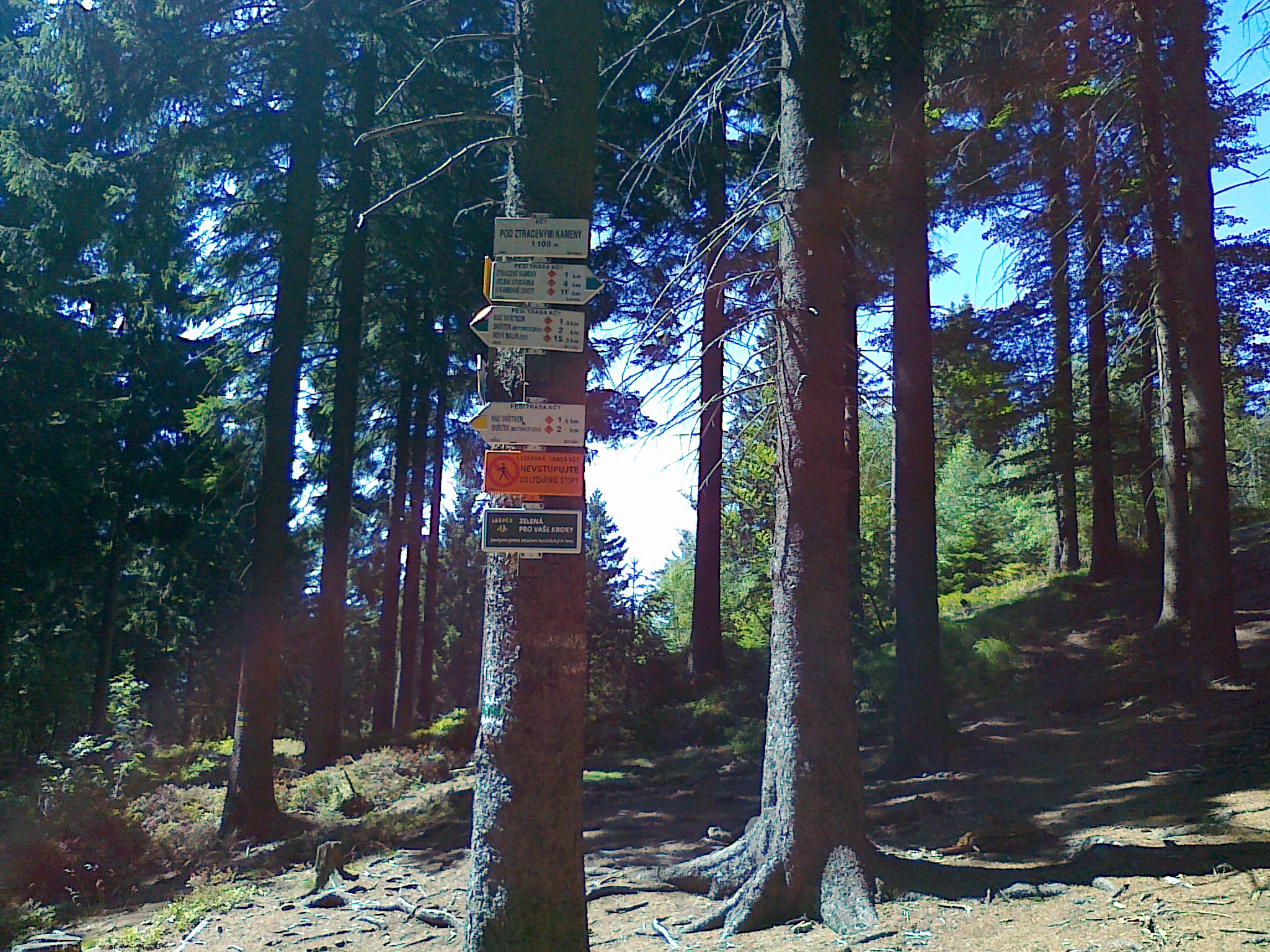 Skrzyżowanie szlaków o nazwie Pod Ztracenými kameny - 1100 m